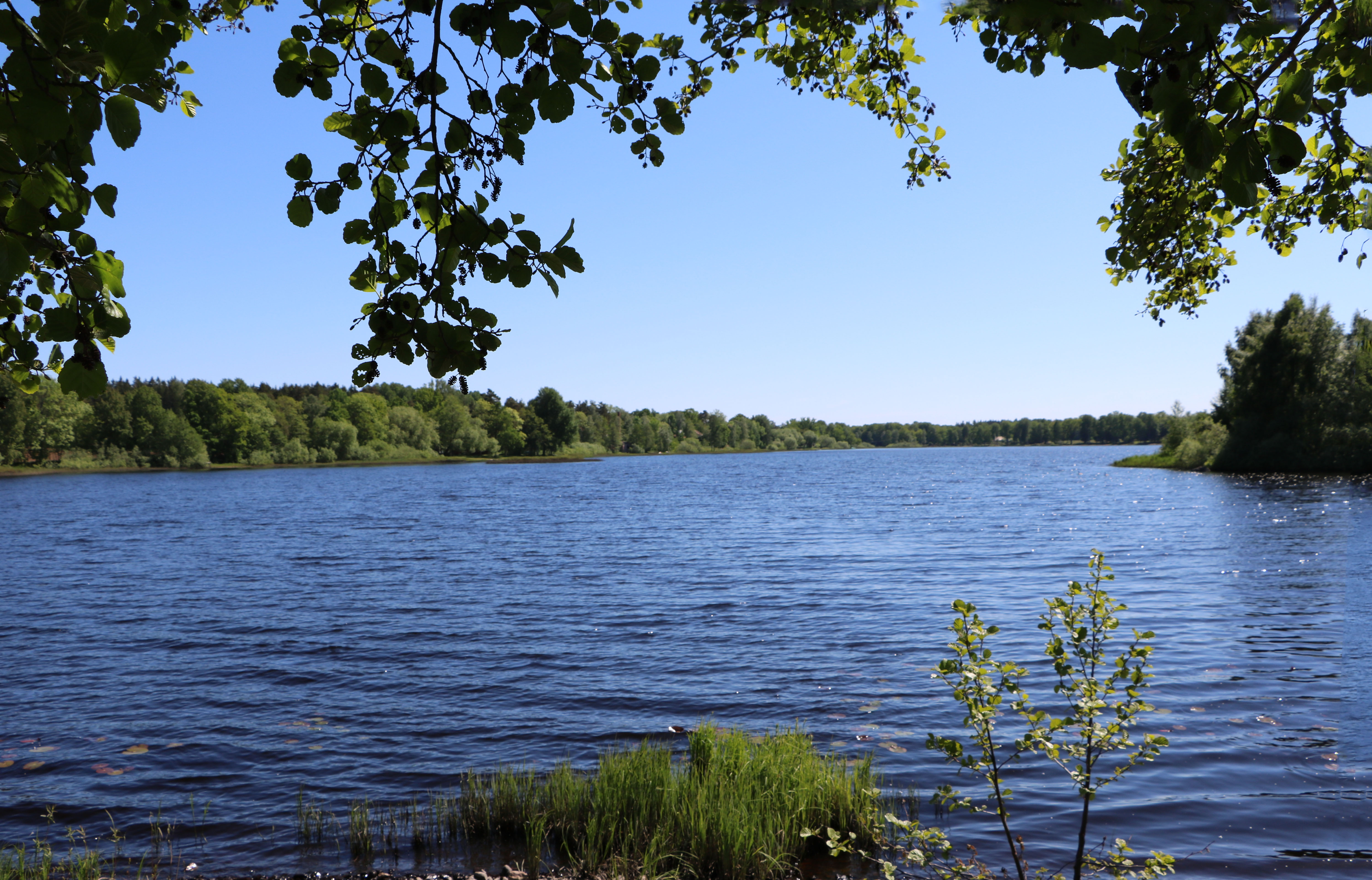 Kyrksjön är en sjö belägen i Vissefjärda och ingår i Lyckebyåns huvudavrinningsområde.